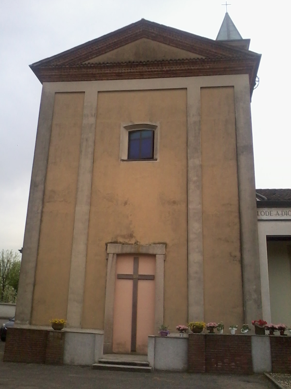 La Chiesa Parrocchiale della Beata Vergine Maria Immacolata a Casate - Bernate Ticino (MI) - Italy